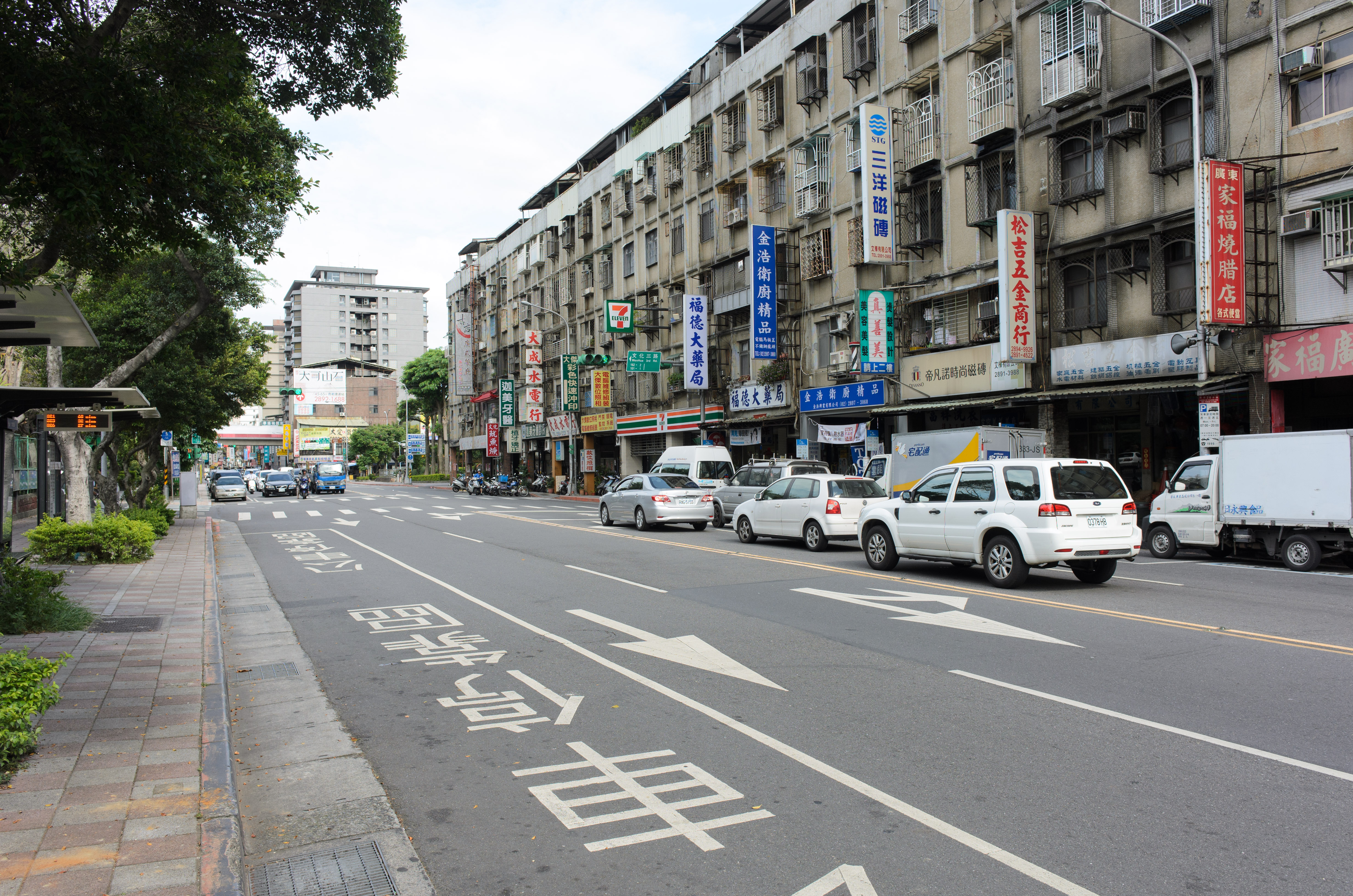 從臺北市北投區中央北路二段與中央北路二段42巷口附近南望中央北路二段，左側是文化國小。